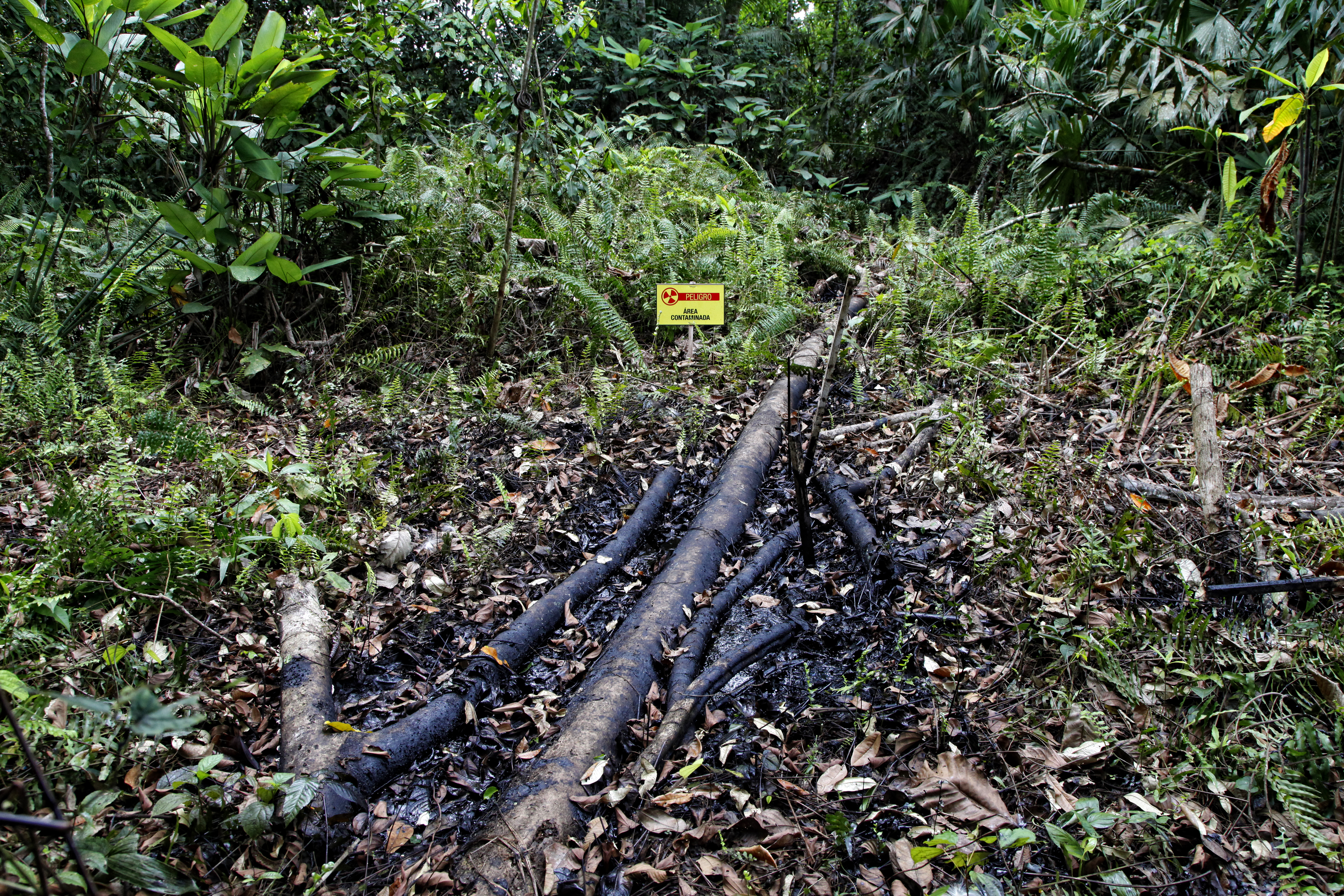 Shushufindi (Sucumbíos). 2013. En la campaña “La mano sucia de Chevron” se realizó la Visita al pozo Aguarico 4, la mencionada petrolera dejó piscinas de desechos tóxicos escondidos por la Amazonía ecuatoriana . Foto: Xavier Granja Cedeño-Cancilleria del Ecuador